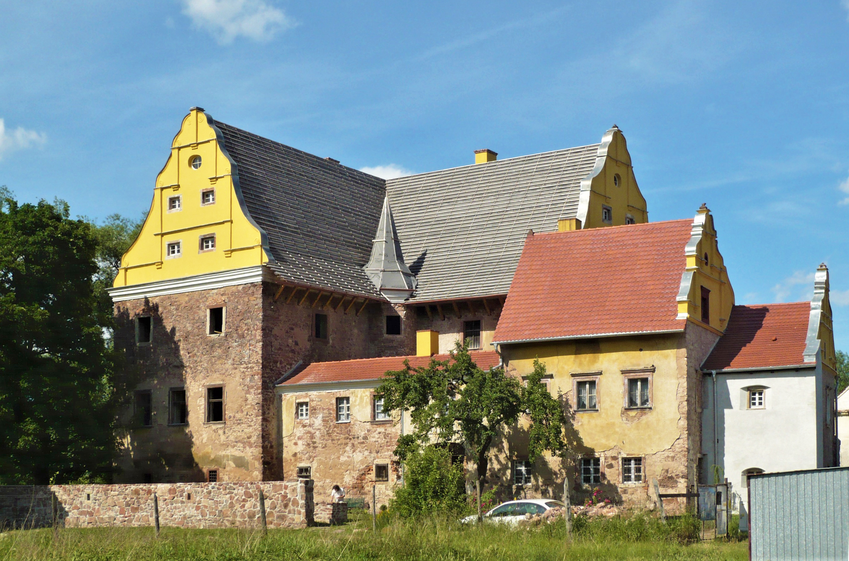 Zamek Kapitanowo